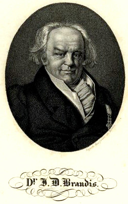 Porträt des Artzes Joachim Dietrich Brandis